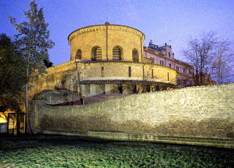 Santa Costanza, Rome. Exterior. In origine questo era il mausoleo di Costantina, figlia dell'imperatore Costantino I.